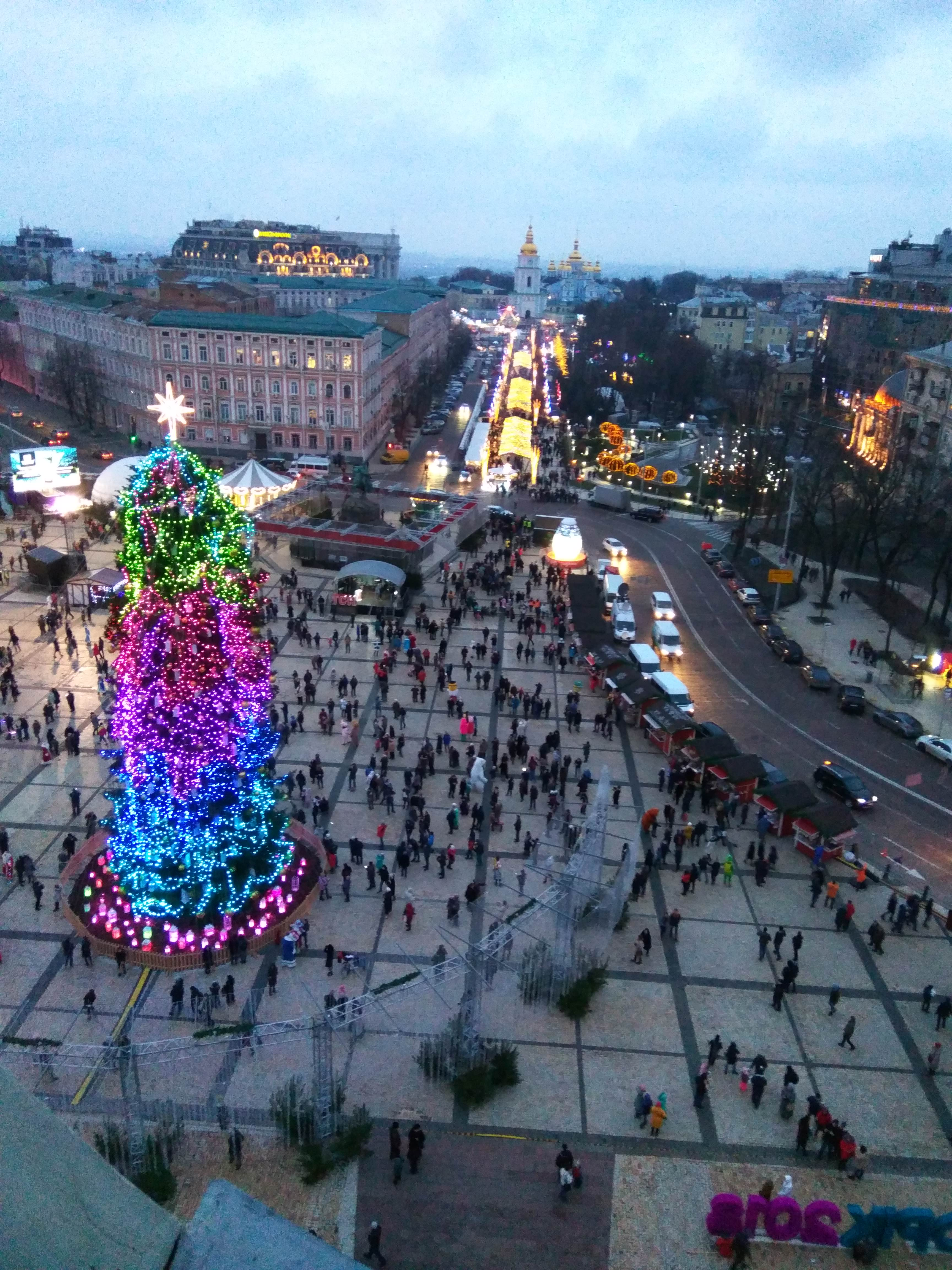 Новорічна ялинка у Києві